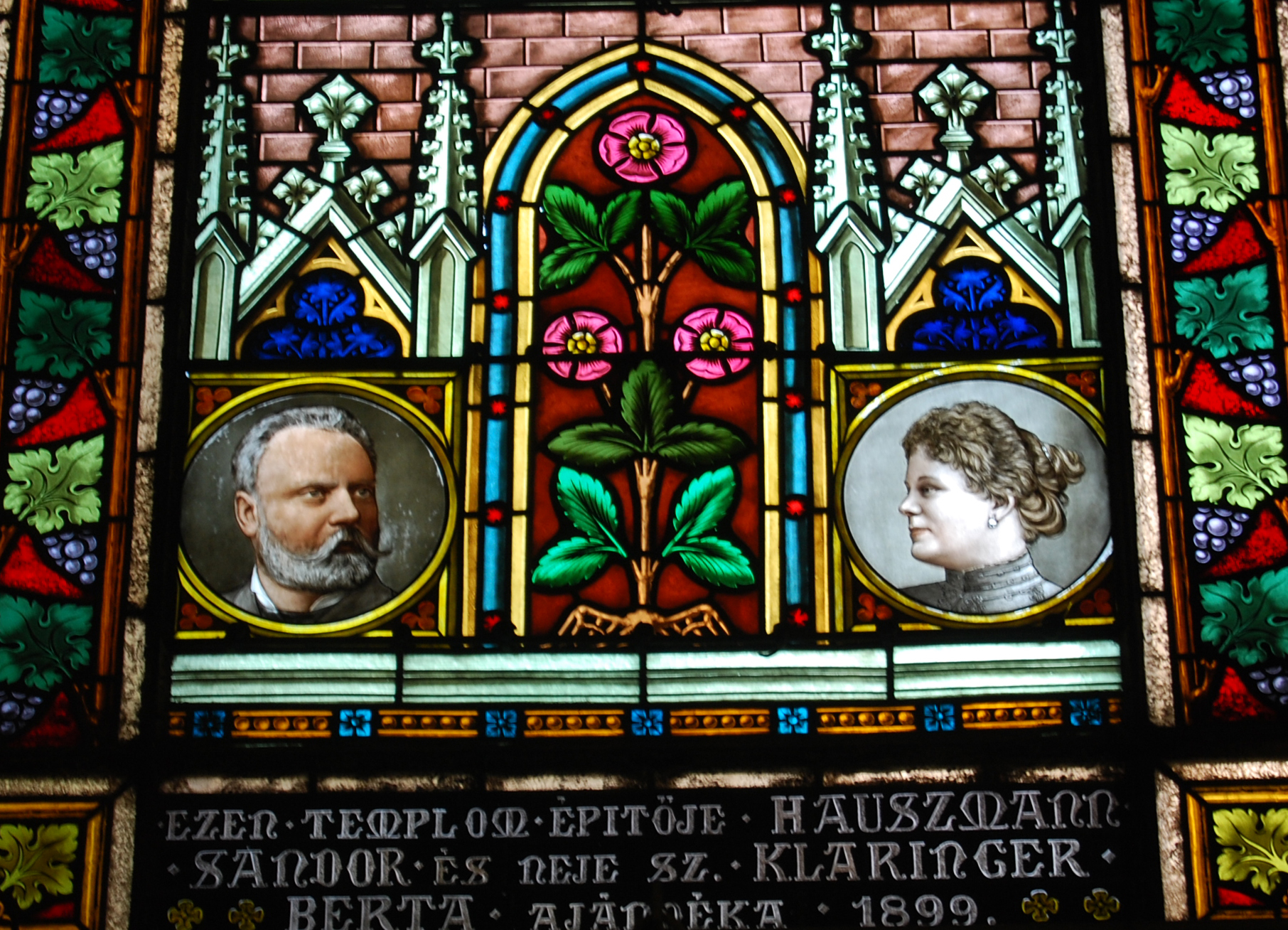 Róth Miksa üvegablaka a máriaremetei templomban Szentkirályi Antalról